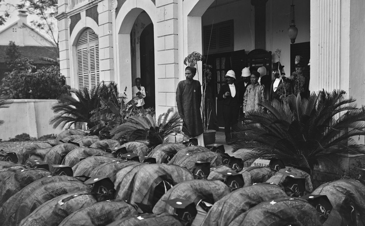 Les cu-nhon faisant les laïs à la résidence de France à Nam-Dinh (Tonkin). Sur le perron : le gouvernement général Paul Doumer (en chapeau mou), Nguyễn Trọng Hợp, Cao Xuân Dục (contre le pilier). Photographie d'André Salles.